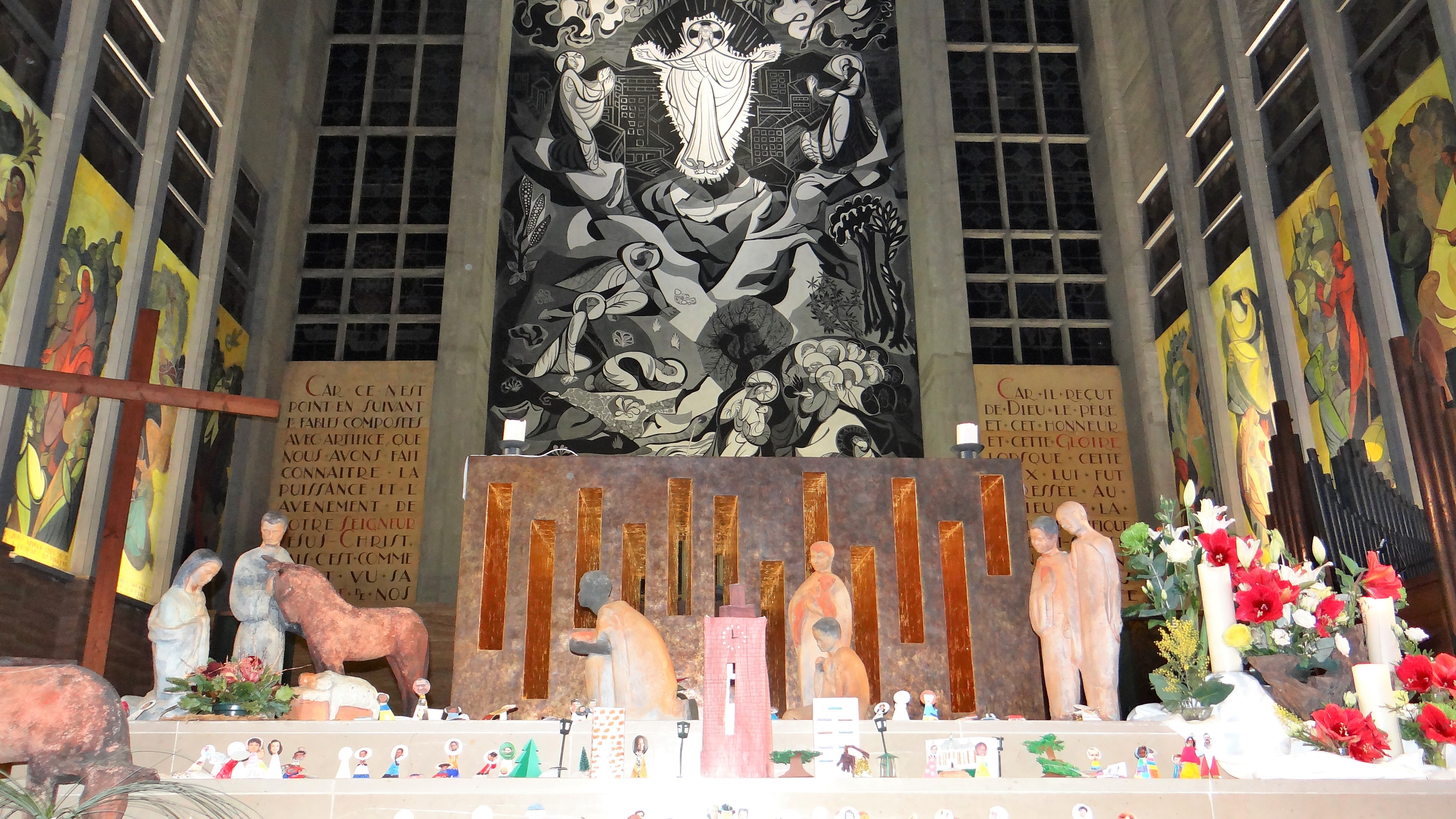 cf. pour la fresuqe page 49